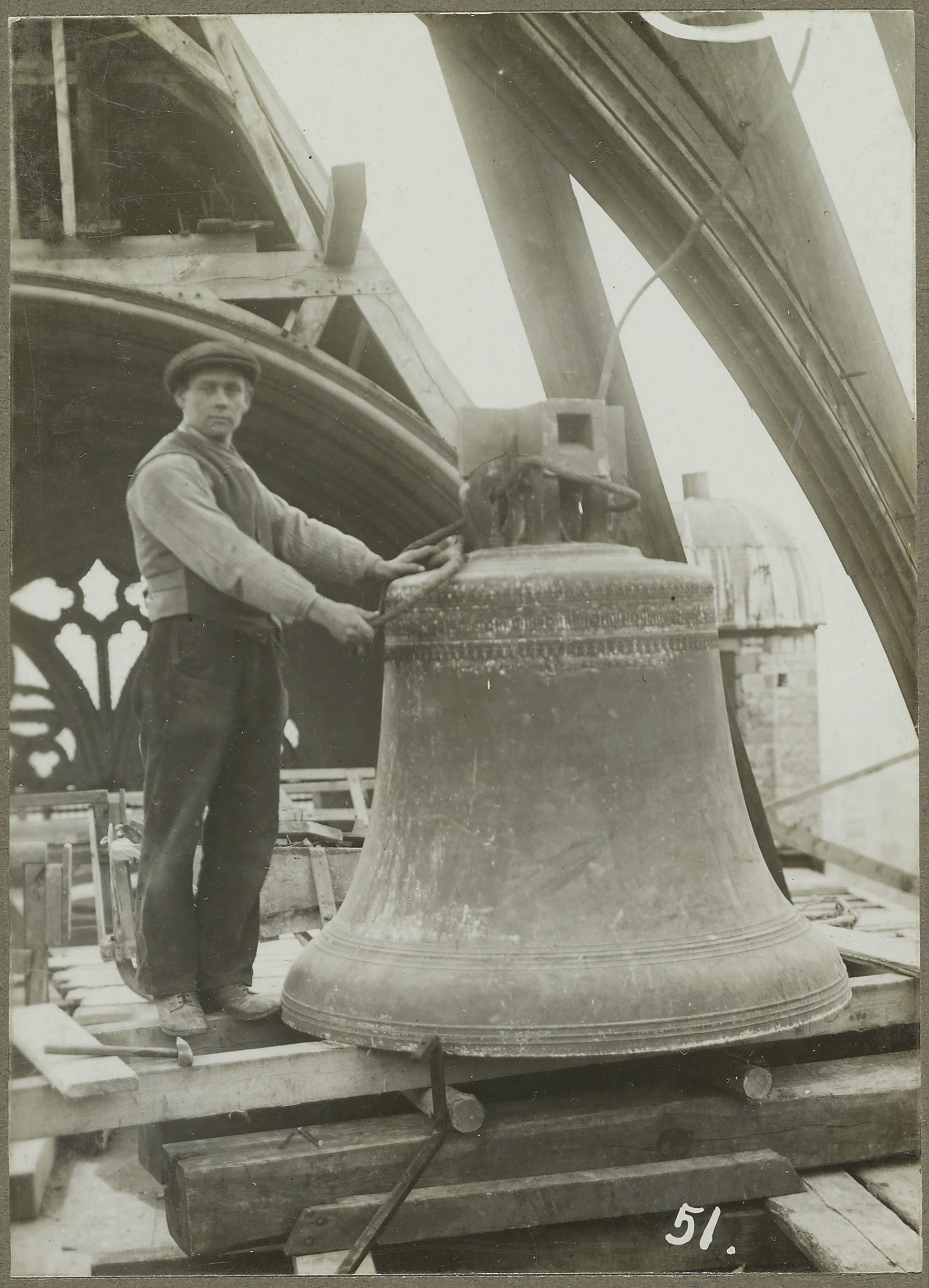 Grote of Sint-Laurenskerk: Detail tijdens restauratie: de heeluurslagklok. Opschrift: Ick heet Saligmaeker. Als ick geluydt word bedrijf ick rou over de dooden. Door mijn clanck verdrijf ick de listen en lagen des Satans. Heer Meiard Man Abt tot Egmond heeft mij gegeven. Casparus en Johannes Moer fecerunt 1525. (opmerking: Nr 51 uit reeks)